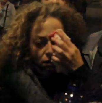 Ester Quintana va denunciar haver estat ferida pels mossos d'esquadra a l'ull esquerre a la manifestació del 14-N a Barcelona, va perdre la visió de l'ull.